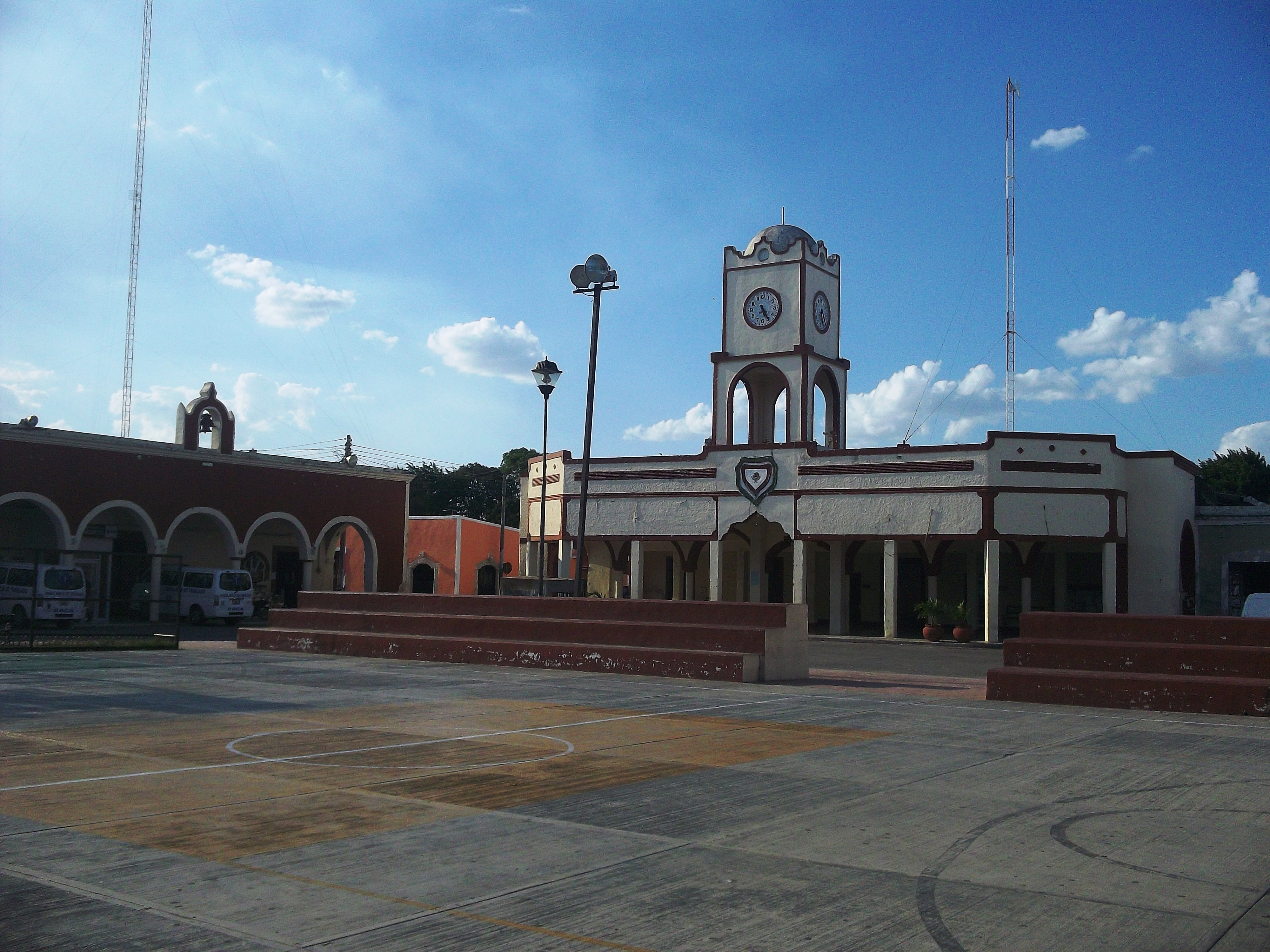 Palacio municipal de Baca, Yucatán.